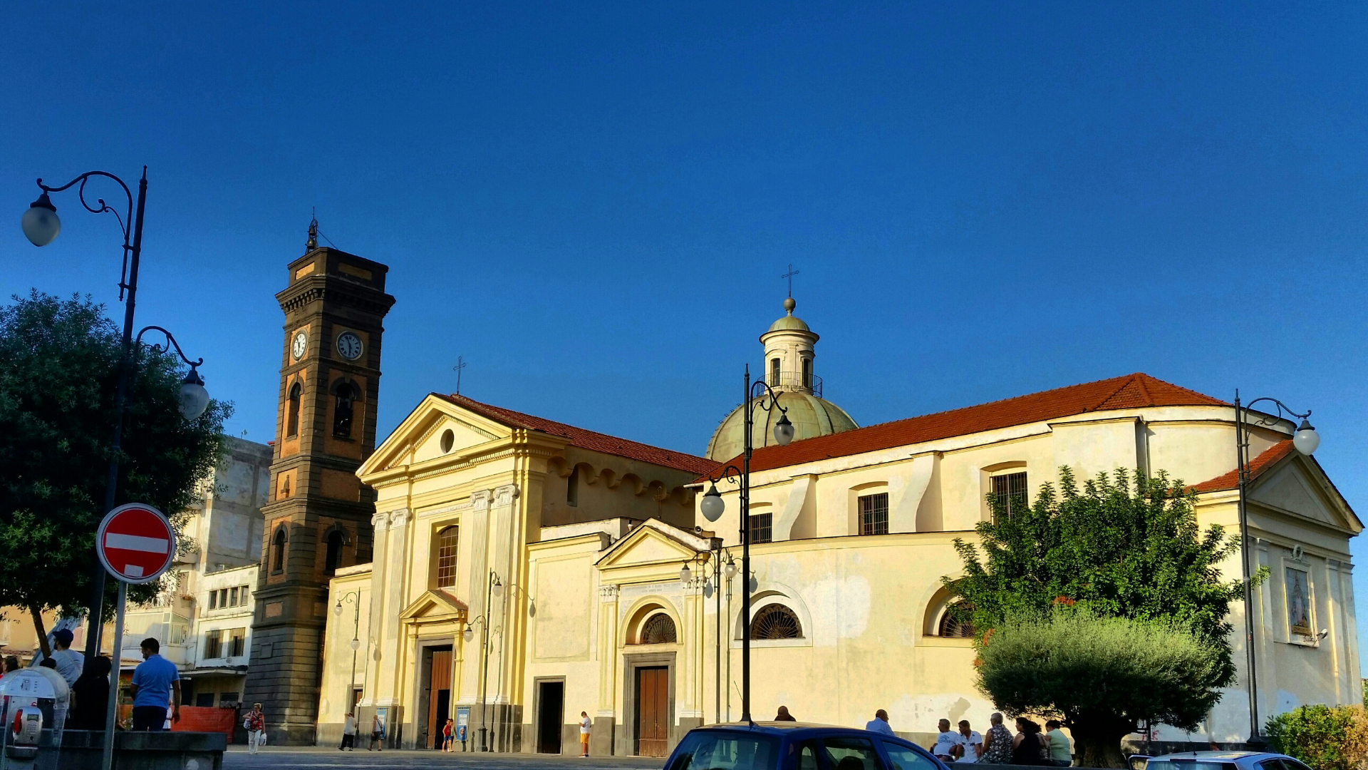 Centro storico di Scafati.